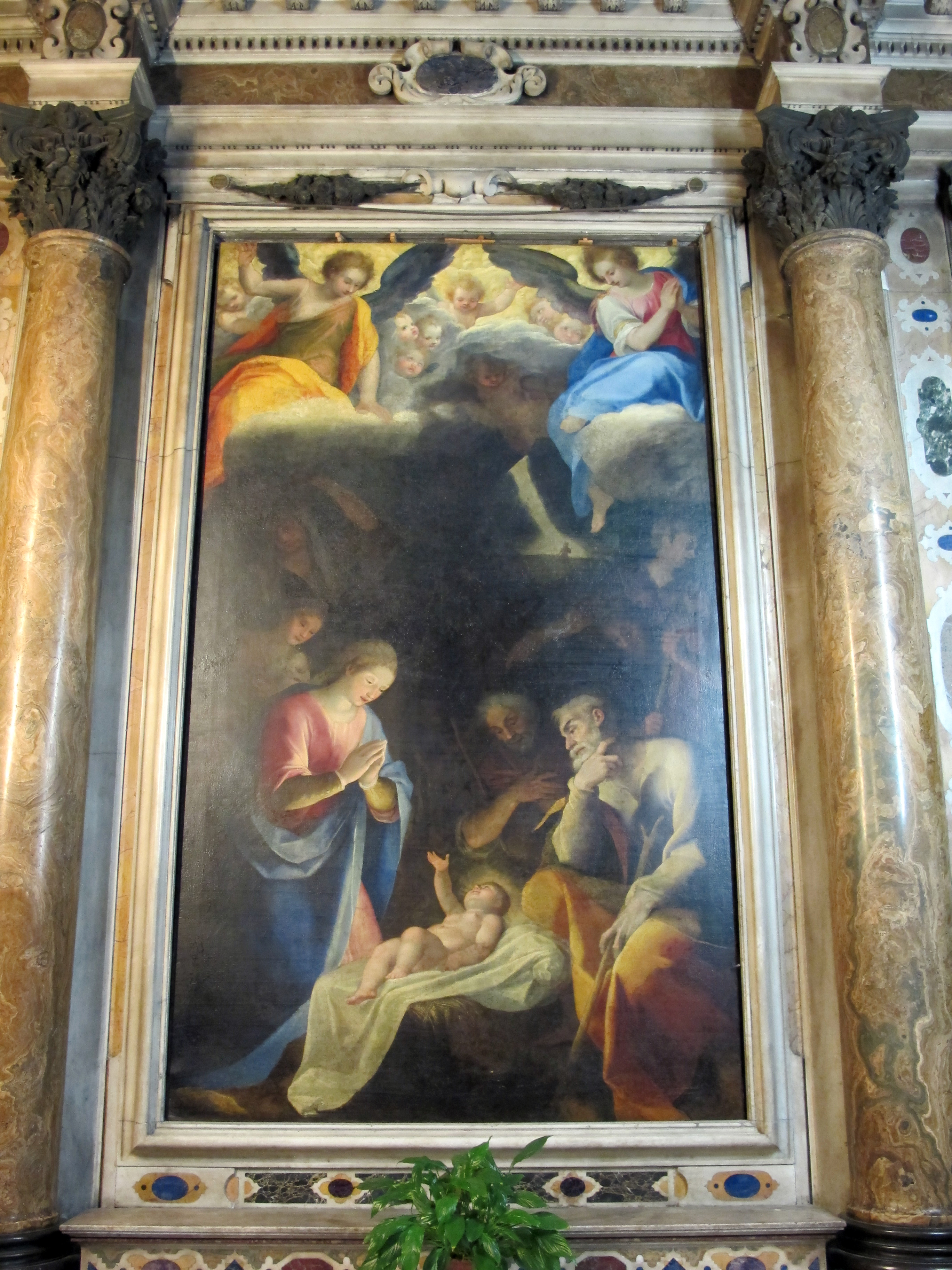 San Siro (Genova)